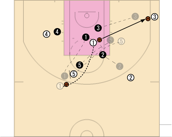 3ポイントフォーメイション